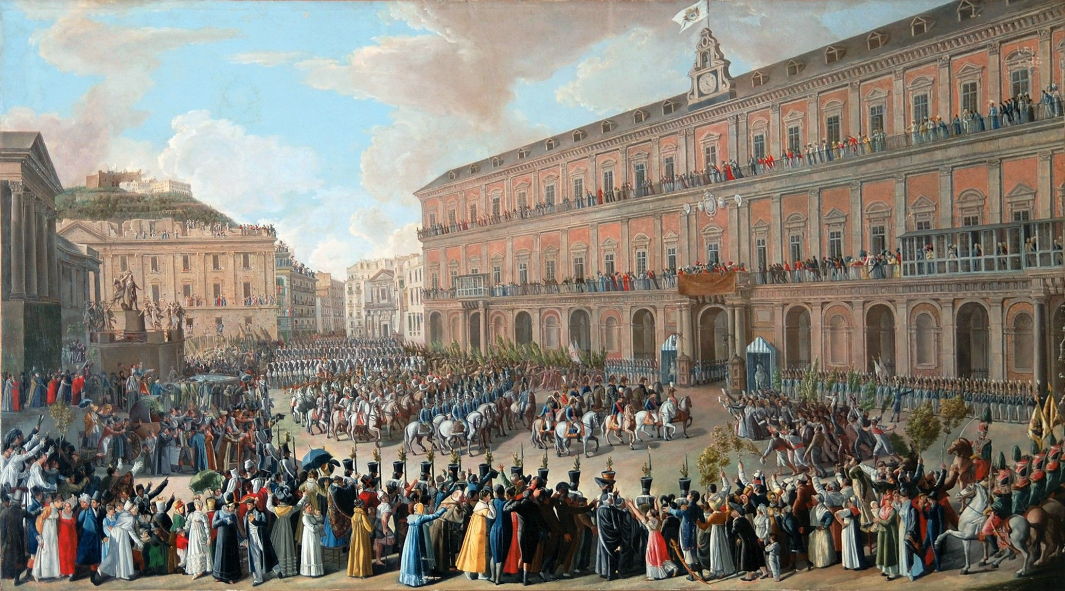 Paolo Albertis - Entrata a Napoli di Ferdinando I con gli Austriaci. Luogo di esposizione sconosciuto.